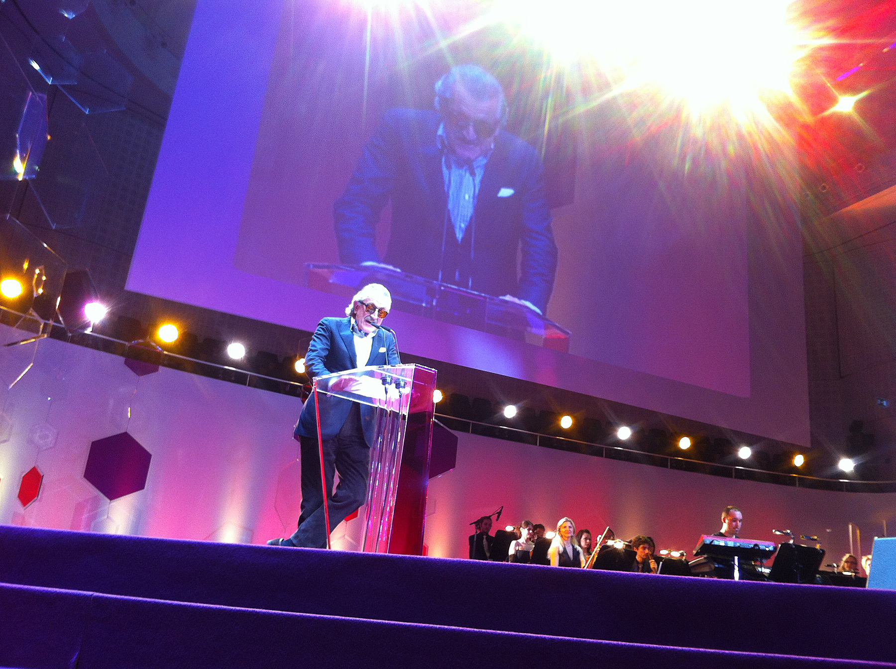 Schweizer Filmpreis "Quartz" 2012 Dieter Meier (Yello)